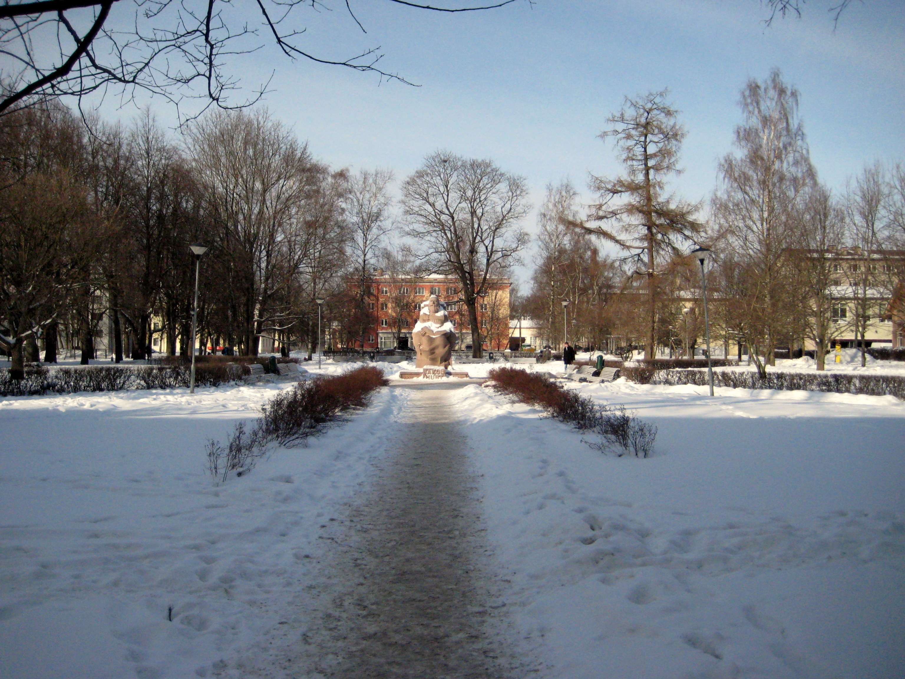 Vanemuise park, Tartu